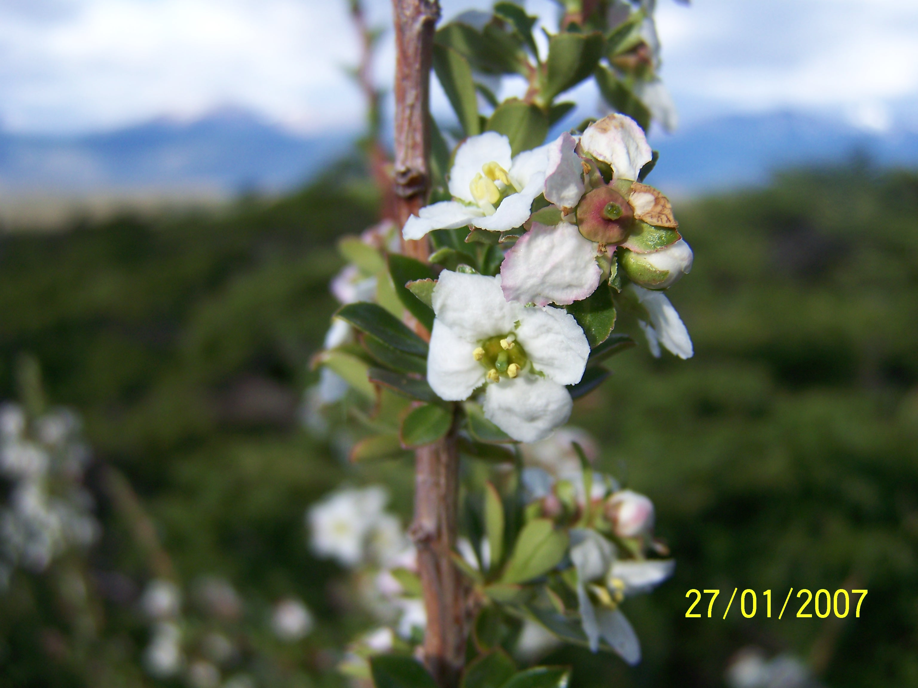 Flora en la cueva del Milodon